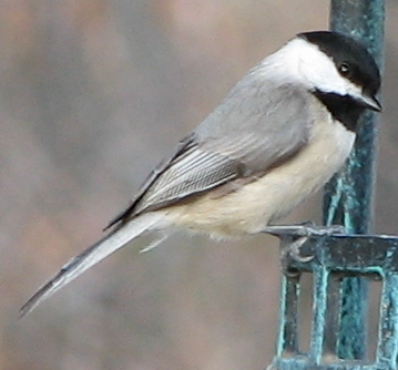 Carolina Chicadee (Poecile carolinensis)